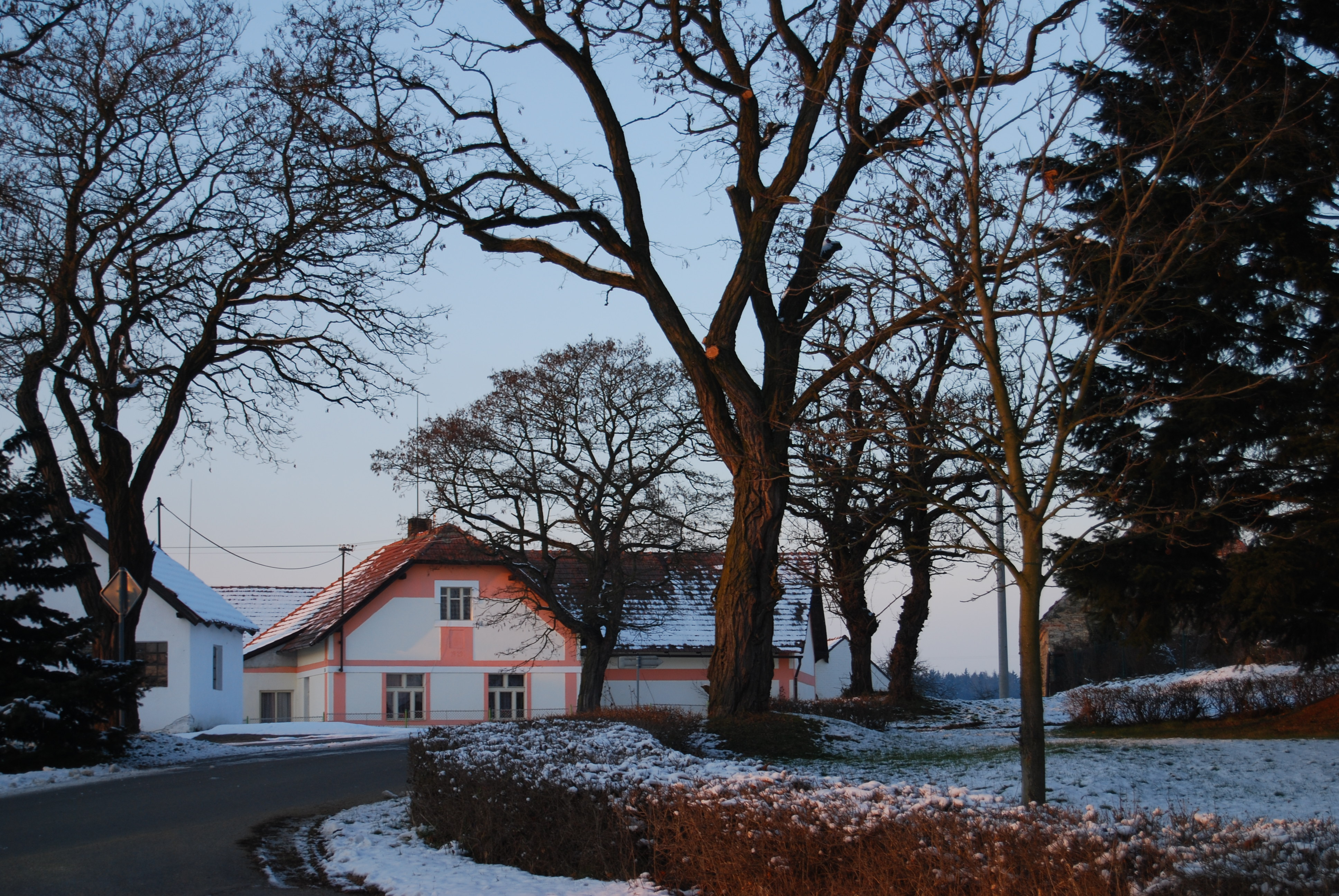 Pohled na část obce. Boješice je část města Mirovice v okrese Písek. Česká republika.